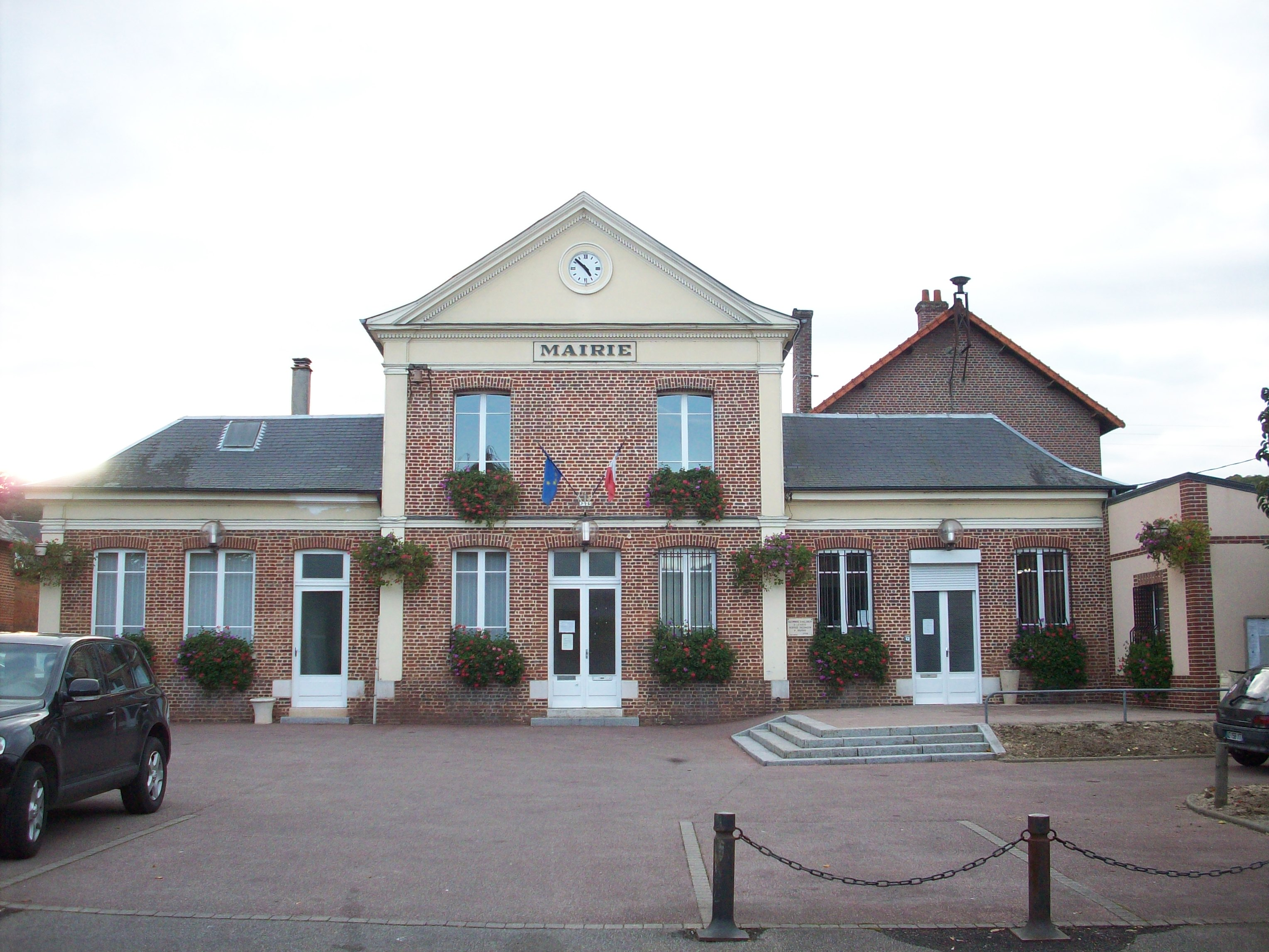 Mairie de Perriers-sur-Andelle